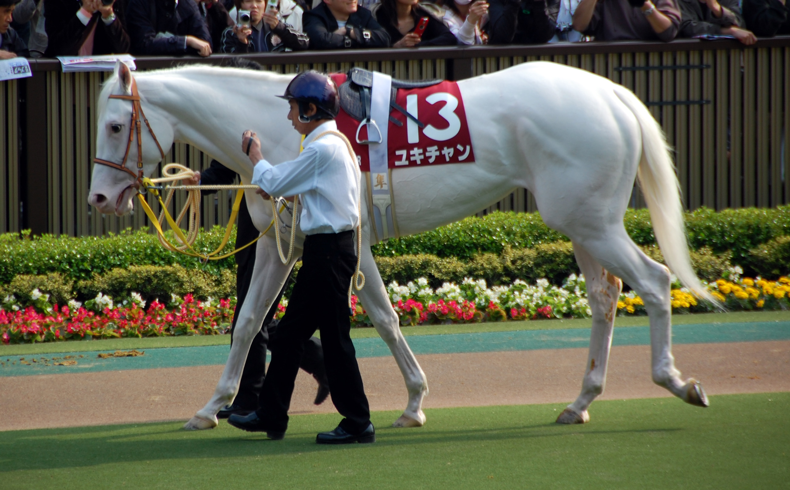 日本の競走馬、ユキチャン。2008年4月27日 東京競馬場にて。